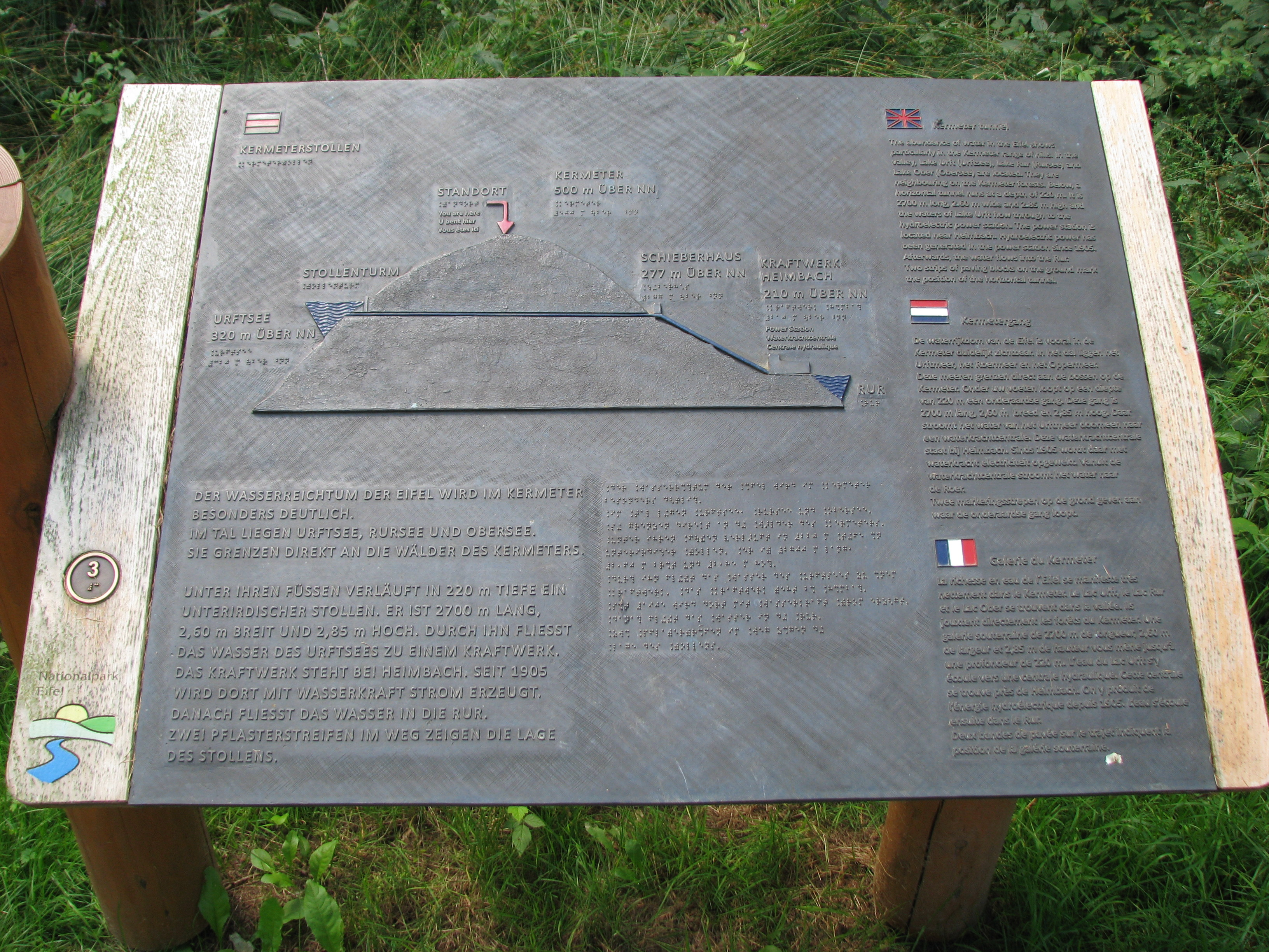 Barrierefreie Hinweistafel auf den Kermeterstollen an einem Wanderweg auf dem Kermeter im barrierefreien Natur-Erlebnisraum „Wilder Kermeter“. Der Kermeterstollen kann auch von Blinden an Hand eines ertastbaren Reliefs und einer Beschreibung in der Blindenschrift Braille erfahren werden.